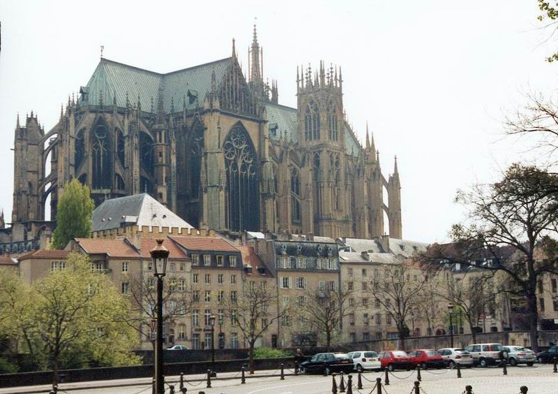 Metz panorama.jpg